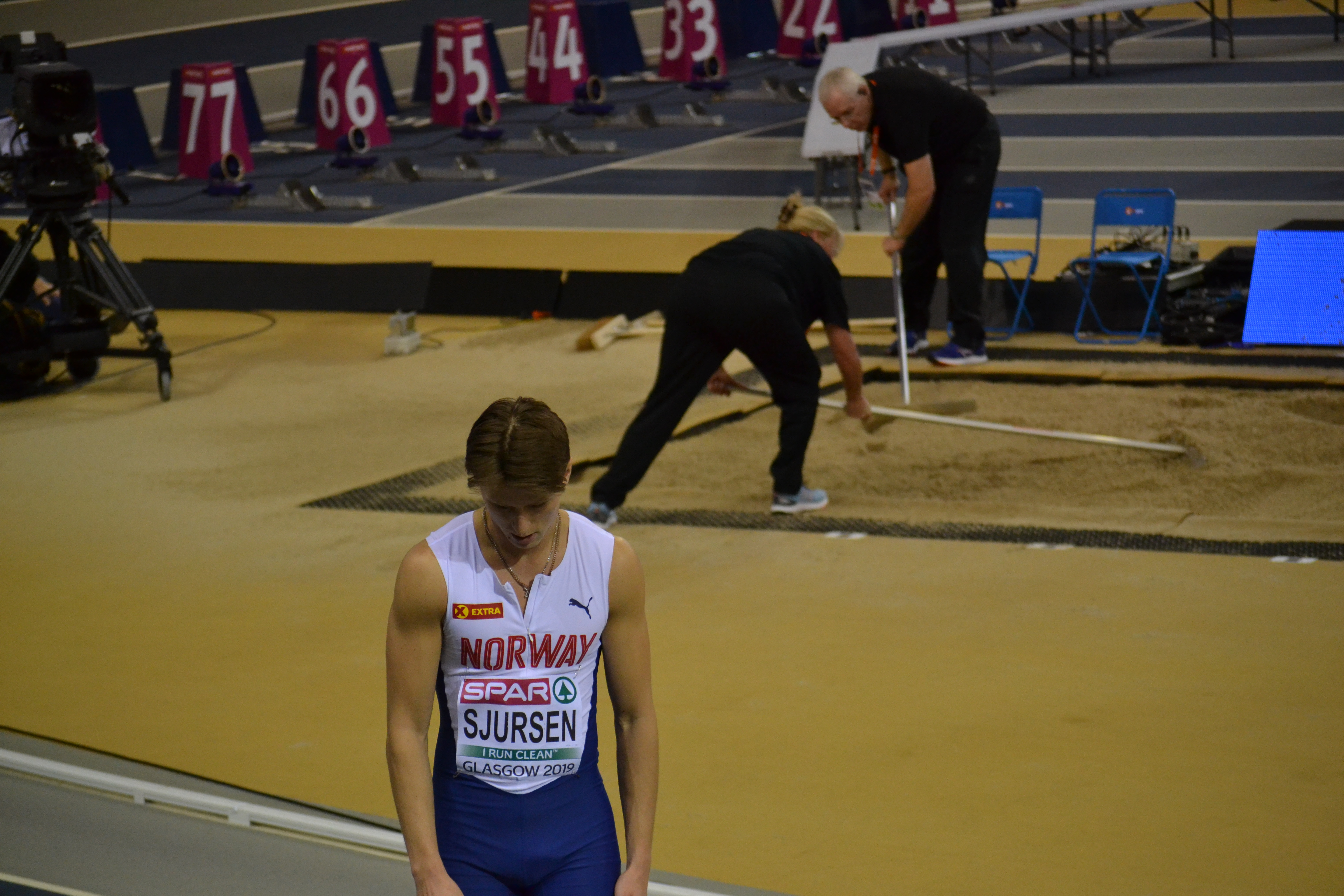 Mens Long Jump